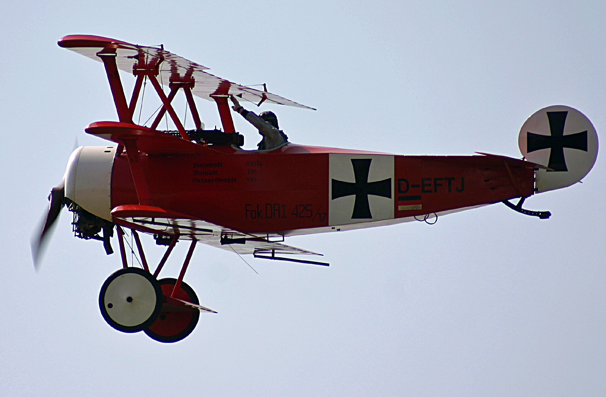 Der Fokker Dr1 Nachbau des "fliegenden Museums Josef Koch" im September 05 in Kircheim unter Teck auf der Hahnweide